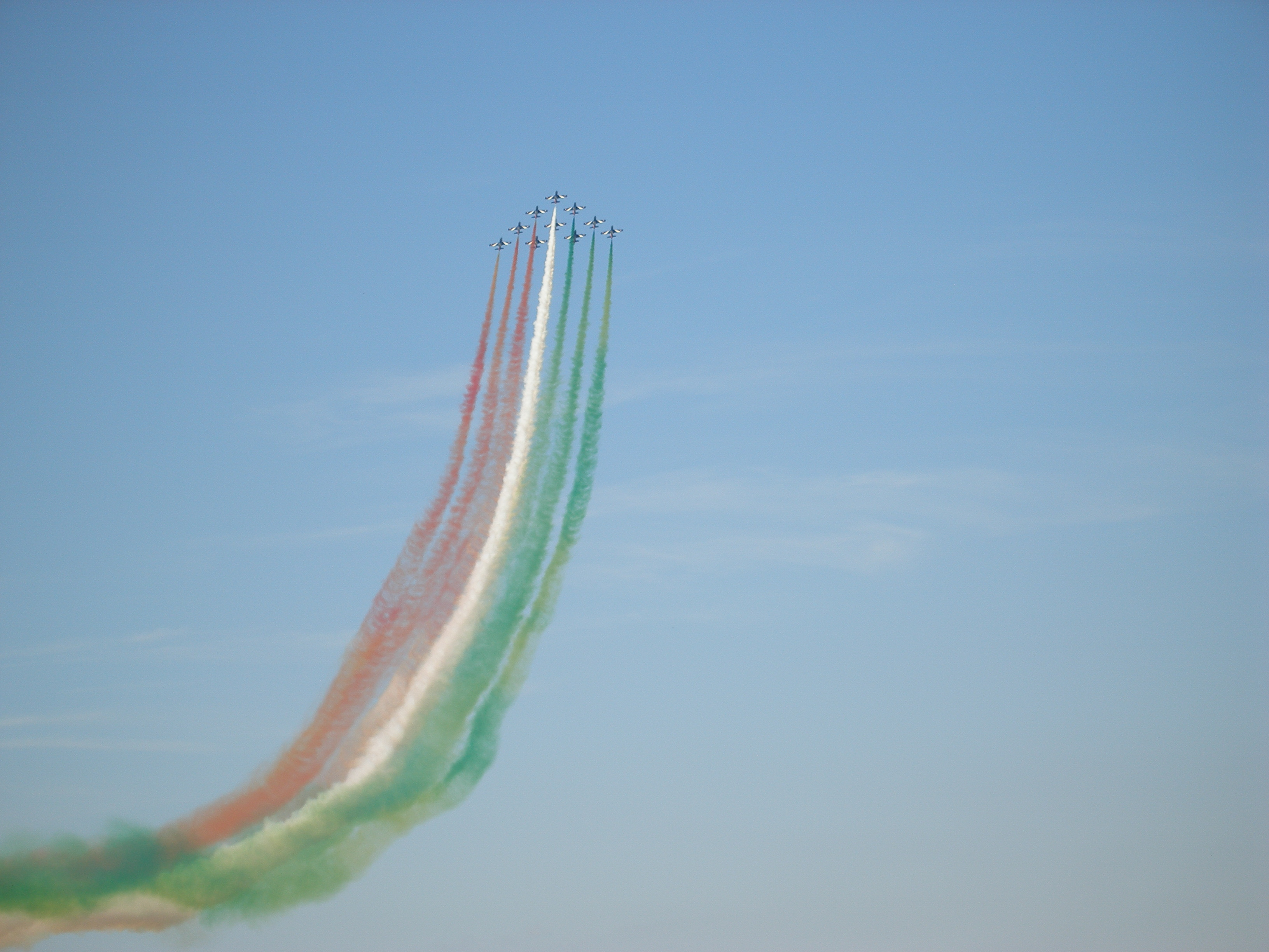 Formazione delle Frecce Tricolori il 12 settembre 2012 durante l'esibizione al 50°esimo dalla fondazione